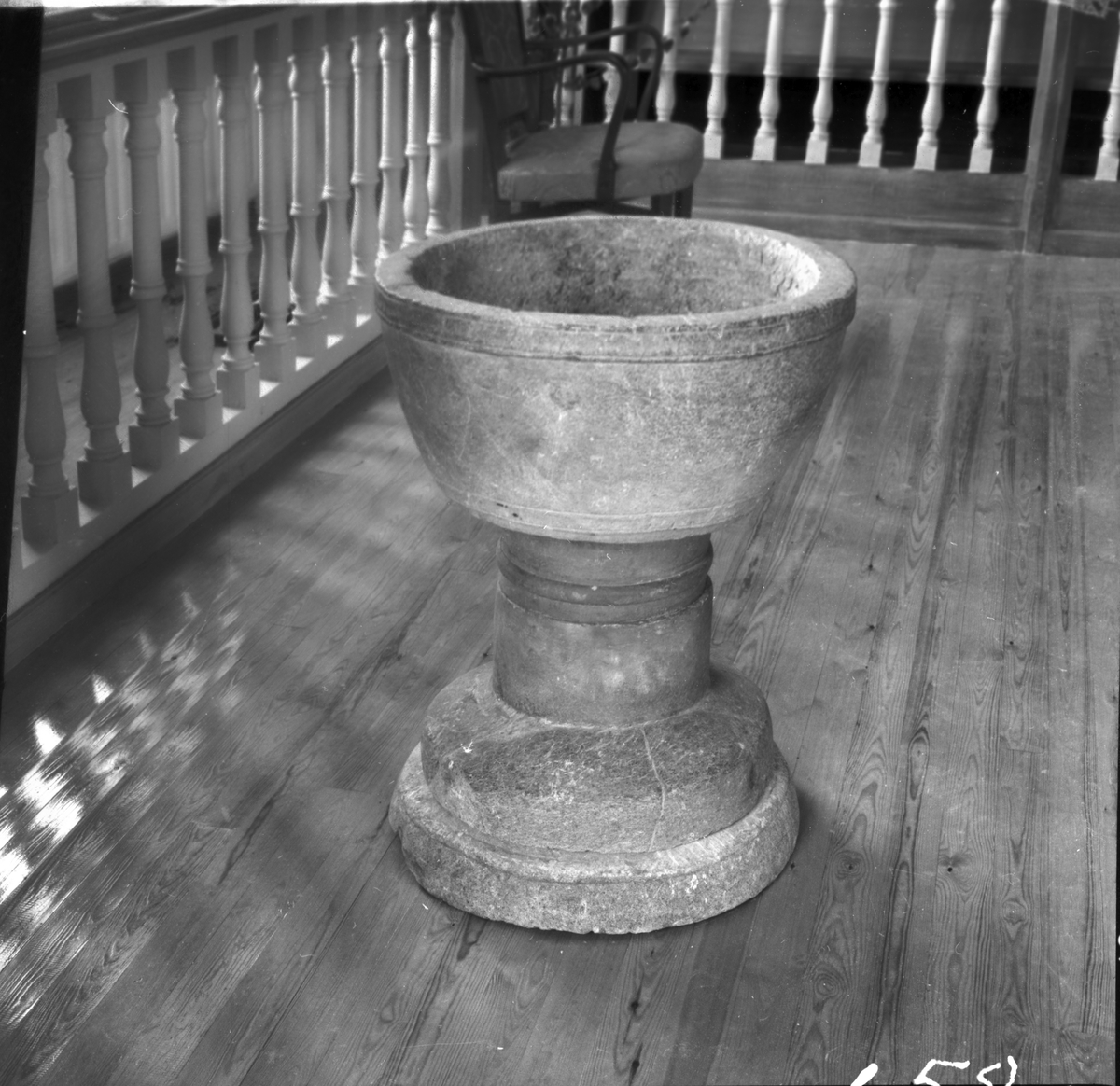 Nössemarks kyrka. Dopfunt.